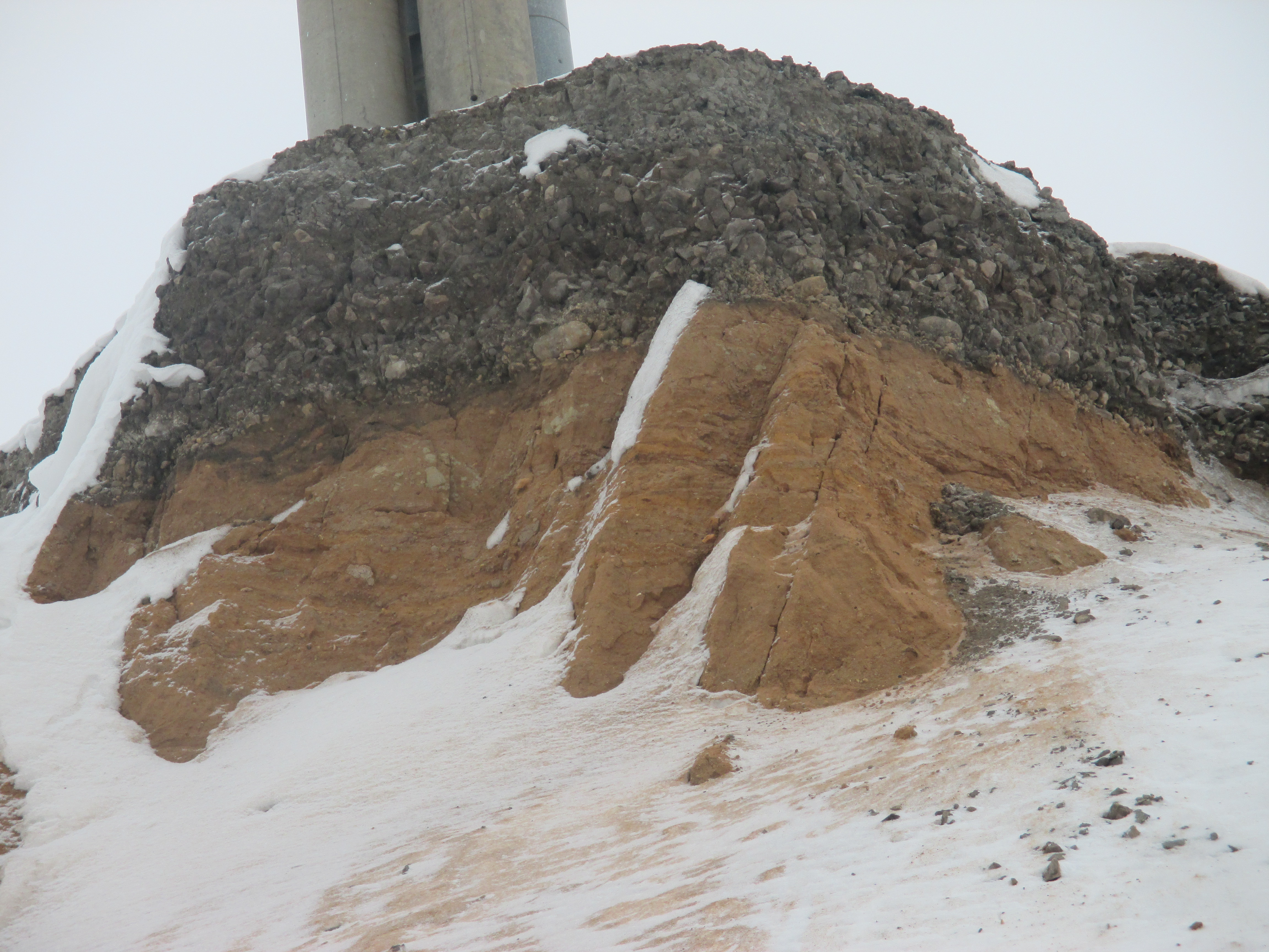 Насыпные грунты (Москва)